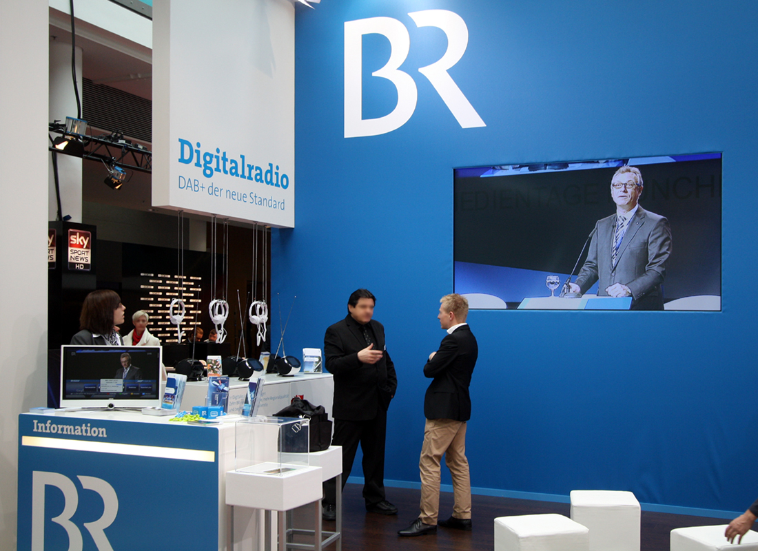 Der Stand des Bayerischen Rundfunks auf den Münchner Medientagen (im Jahr 2011). Auf dem Monitor: Siegfried Schneider, Präsident der BLM.